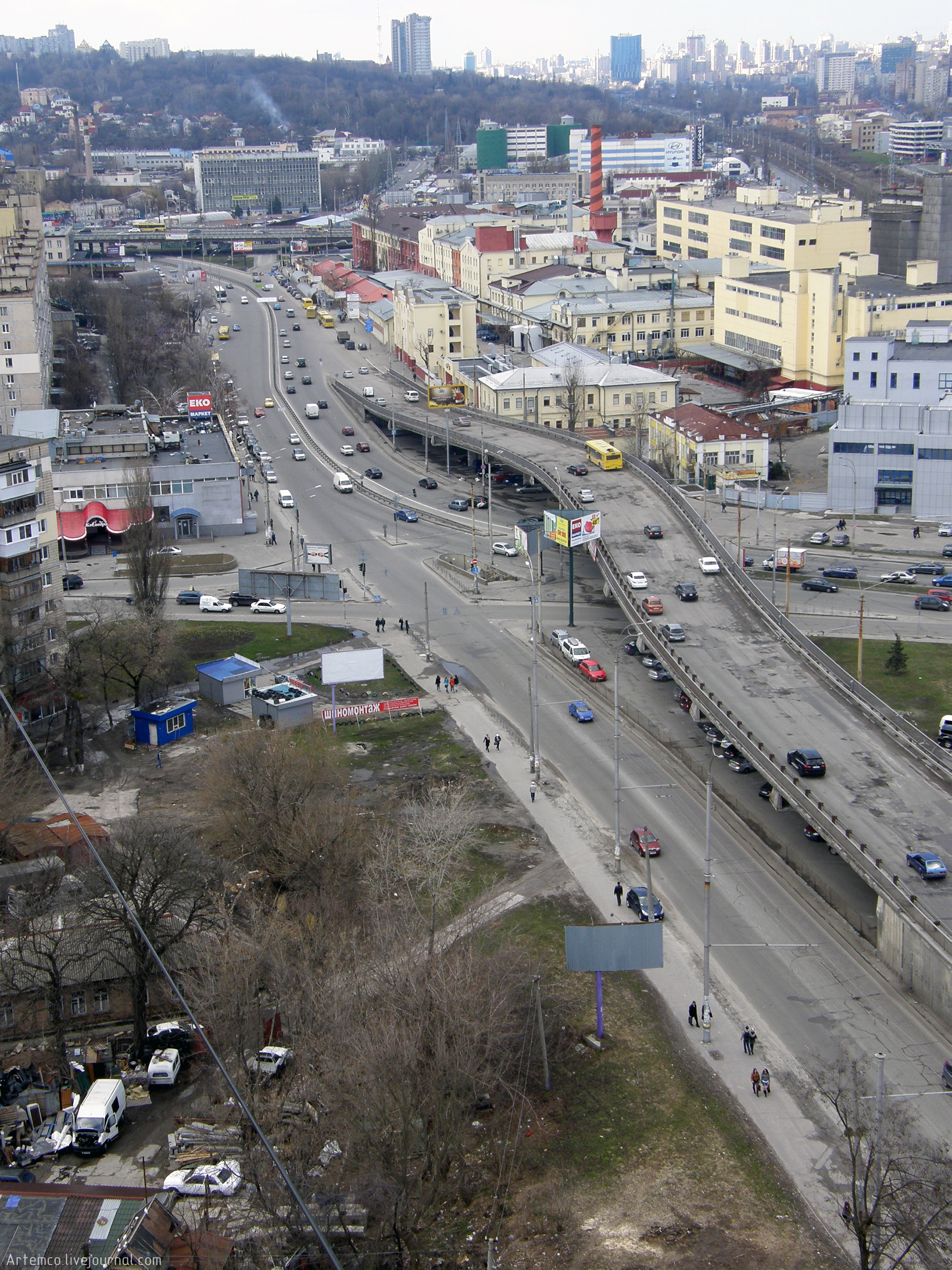 просп. Науки от Сапёрно-Слободской ул. до Московской пл.